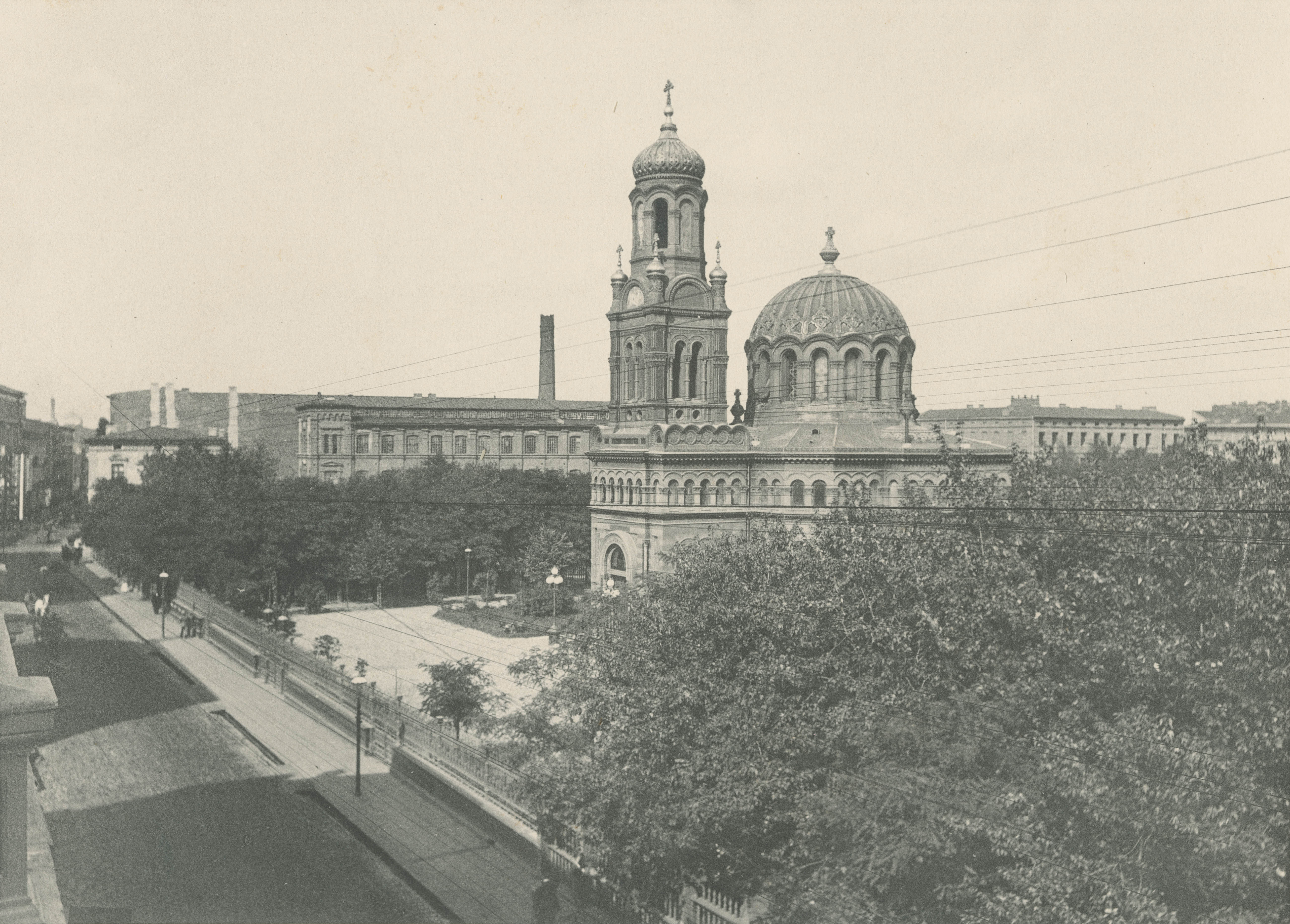 Fotografia Bronisława Wilkoszewskiego z albumu „Widoki miasta Łodzi” przedstawiająca cerkiew prawosławną pw. św. Aleksandra Newskiego i park miejski Kolejowy (ob. Stanisława Moniuszki) znajdujące się przy ul. Widzewskiej (ob. ul. Kilińskiego). Obydwa obiekty zostały zaprojektowane przez ówczesnego architekta miasta Hilarego Majewskiego. Cerkiew powstała w latach 1880-1884. Stanowiła wotum dziękczynne za ocalenie życia cara Aleksandra II, zaspakajając jednocześnie potrzebę posiadania własnej świątyni przez społeczność prawosławną. Nieprzypadkowa jest jej lokalizacja, bliskość dworca kolejowego miała zapewniać, że pierwszym, co ujrzą podróżni przybywający do Łodzi, będzie ten właśnie symbol rosyjskiej obecności w mieście. Jak w przypadku świątyń innych wyznań i tu w komitecie budowy zasiadali miejscowi przemysłowcy różnych wyznań m.in.: Karol Scheibler, Juliusz Heinzel, Ludwik Meyer czy Izrael Kalmanowicz Poznański. Park, w którego sąsiedztwie stoi cerkiew pw. św. Aleksandra Newskiego, powstał nieco wcześniej, bo w 1874 roku według projektu architekta miasta Hilarego Majewskiego, a za realizację odpowiadał ogrodnik Giernot. Był to drugi park publiczny w Łodzi. W latach 60. XX otrzymał on obowiązującą do dziś nazwą im. Stanisława Moniuszki.